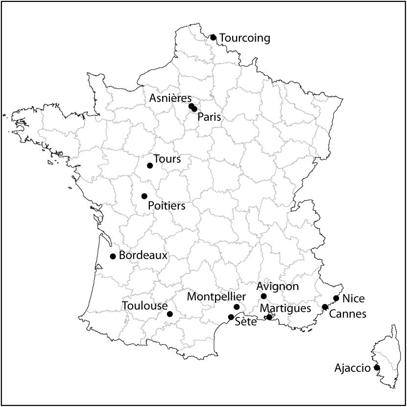 Carte des clubs engagés dans le championnat de France Pro A de volley-ball 2000-2001